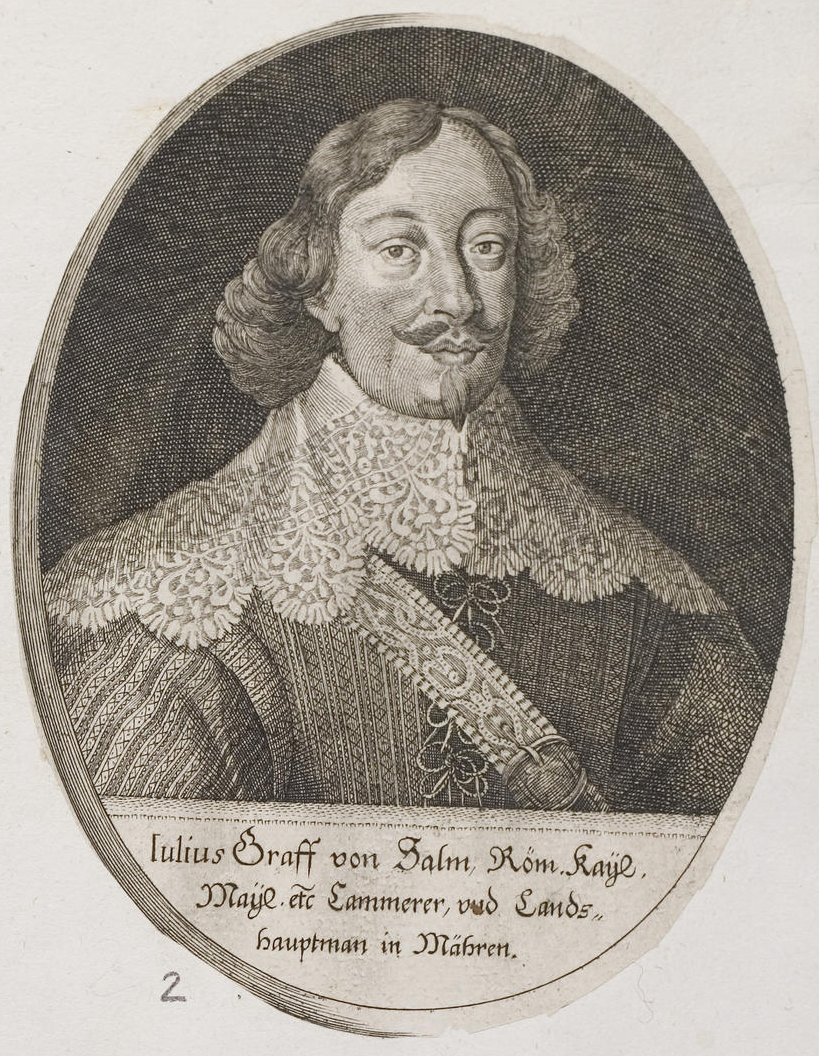 Grafik aus dem Klebeband Nr. 2 der Fürstlich Waldeckschen Hofbibliothek Arolsen Motiv: Julius von Salm-Neuburg (1600–1654), Landeshauptmann von Mähren